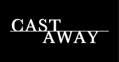 Titre du film Seul au monde (Cast Away)